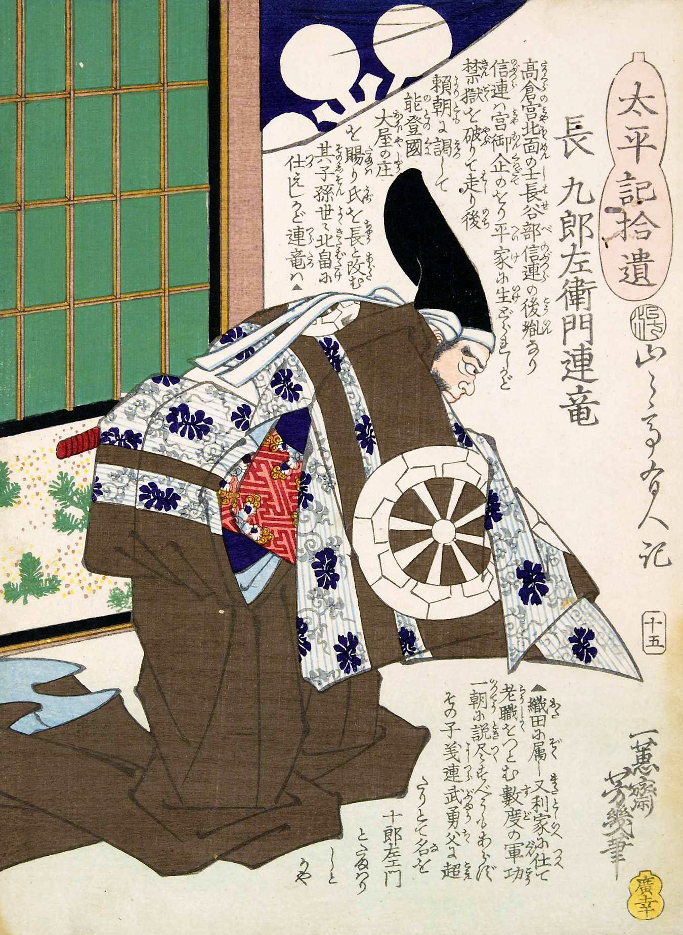 「太平記拾遺十五：長九郎左衛門連竜」